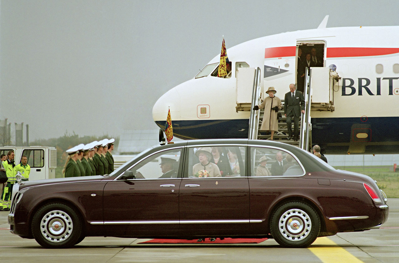 Queen Elisabeth II (visit on 04/11/2004) Düsseldorf 2005, 219 x 145 cm Pigmenttinte auf Canvas und Keilrahmen